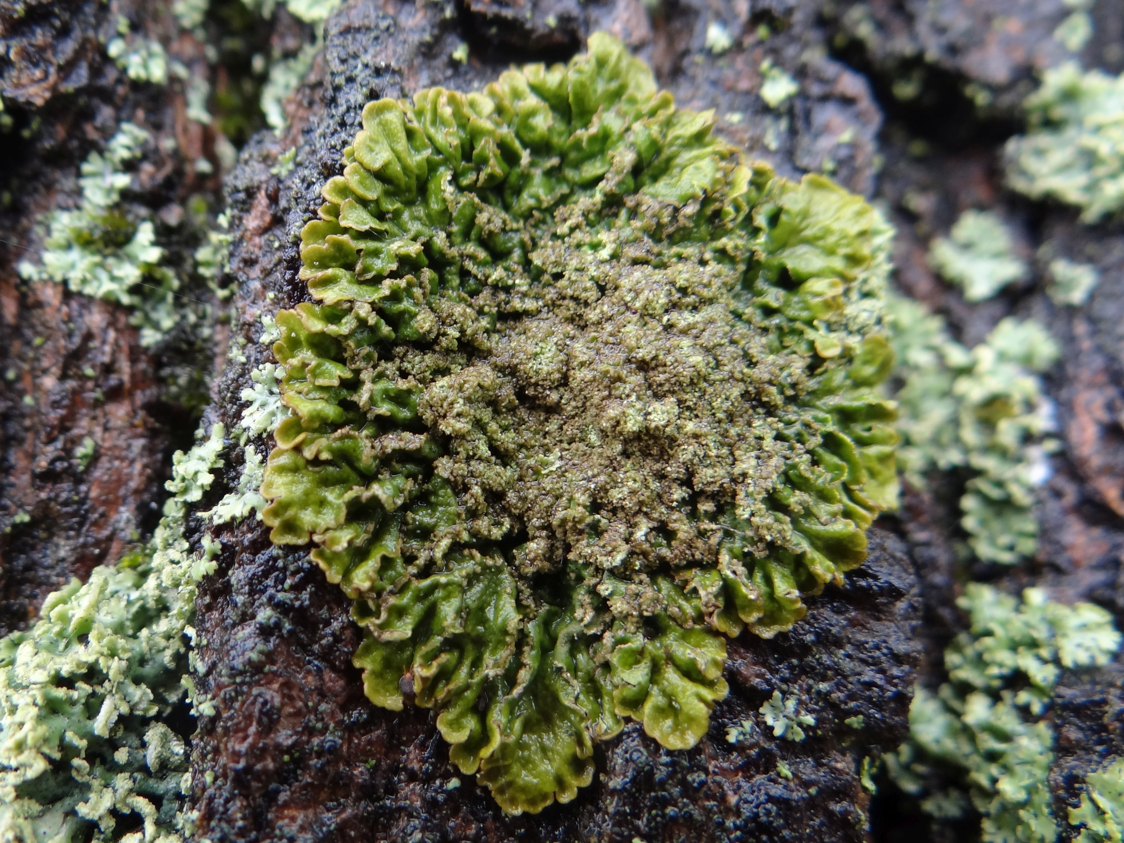 Melanelixia fuliginosa (location: Poland, Zakliczyn, drzewa przy kościele franciszkanów)